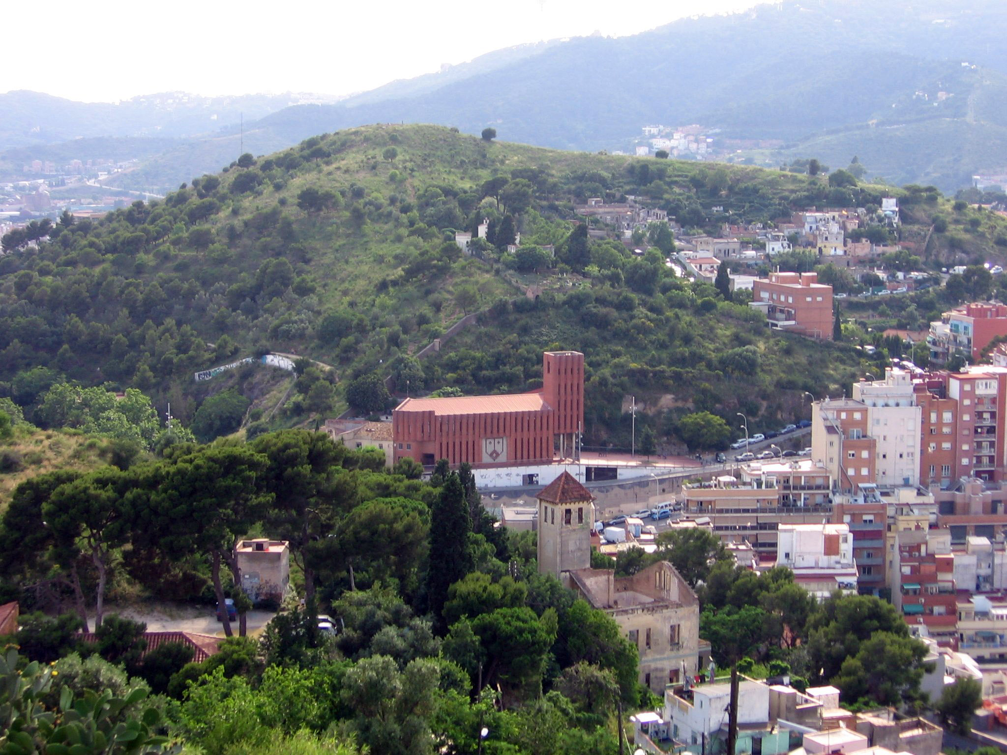 Turó del Carmel.